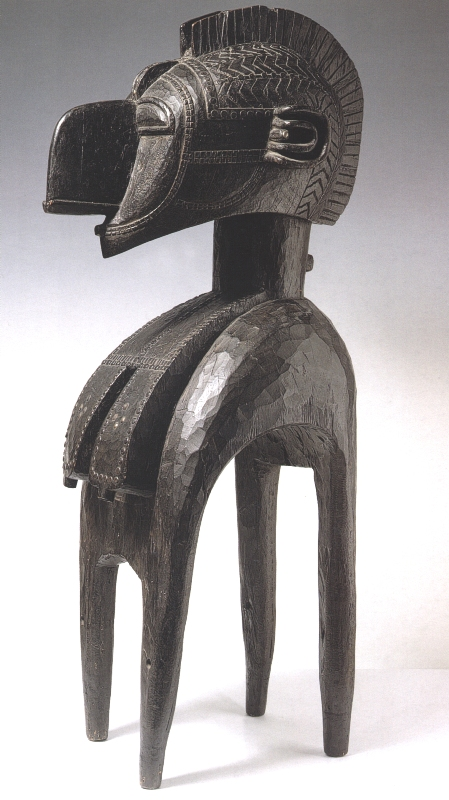 MASCHERA D'MBA (NIMBA) - Il corpo (busto) della figura è reso attraverso volumi semplici e massicci in modo che i tratti del volto e i seni si staglino in maniera netta; la simmetria bilaterale della figura è sottolineata dal rilevo che va dal naso alla cresta, dalle treccine incise sulla testa e dalle scarificazioni che presenta sul volto e sui seni. I fori fra i seni consentono al danzatore di vedere; una protuberanza cilindrica posta dietro il collo permette l'attaccatura del costume. Borchie d'ottone. Al centro dell'azione rituale della maschera D'mba è il nesso fra la fertilità delle donne e quella dei campi: le sue performance propiziano le nascite e le piogge, la crescita dei bambini e quella del riso. La maschera danza in tutte le occasioni socialmente importanti come i matrimoni, le nascite, i funerali, i riti per gli antenati, la visita di personaggi di rango o la semina e la raccolta del riso. La maschera è portata da un uomo il cui corpo è nascosto da una grande gonna di rafia agganciata alla struttura lignea (piccola sporgenza tubolare posta dietro il collo) e che afferra con le mani i due supporti anteriori. Due fori posti fra i seni assicurano al danzatore la possibilità di vedere. Si tratta di una rappresentazione della madre il cui seno è allungato e appiattito dall'allattamento. L'insieme costituito da naso, occhi e cresta è una raffigurazione dei genitali maschili e femminili. Il naso adunco inoltre richiama il becco di un uccello e nel contempo la forma della zappa, stabilendo una connessione con i riti agricoli. Acconciatura, decorazioni e forma del naso hanno suggerito possibili rapporti con l'arte dei Malinke e dei Bamana del Mali. Le borchie di ottone sono invece di importazione europea (chiodi da tappezziere).